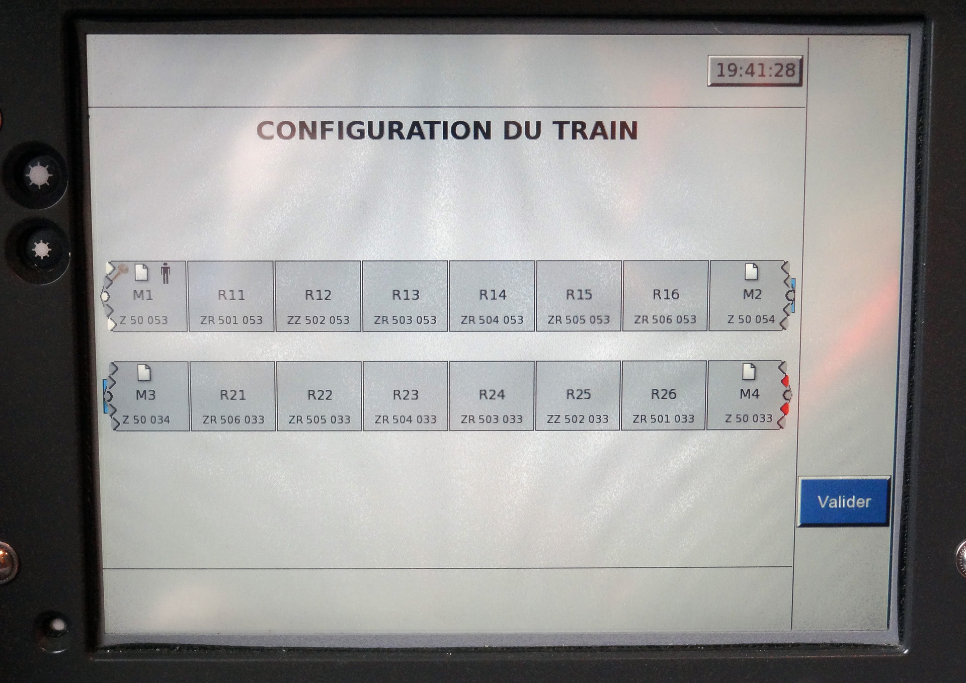 Ecran du SIAC en cabine d'une Z 50000, France.